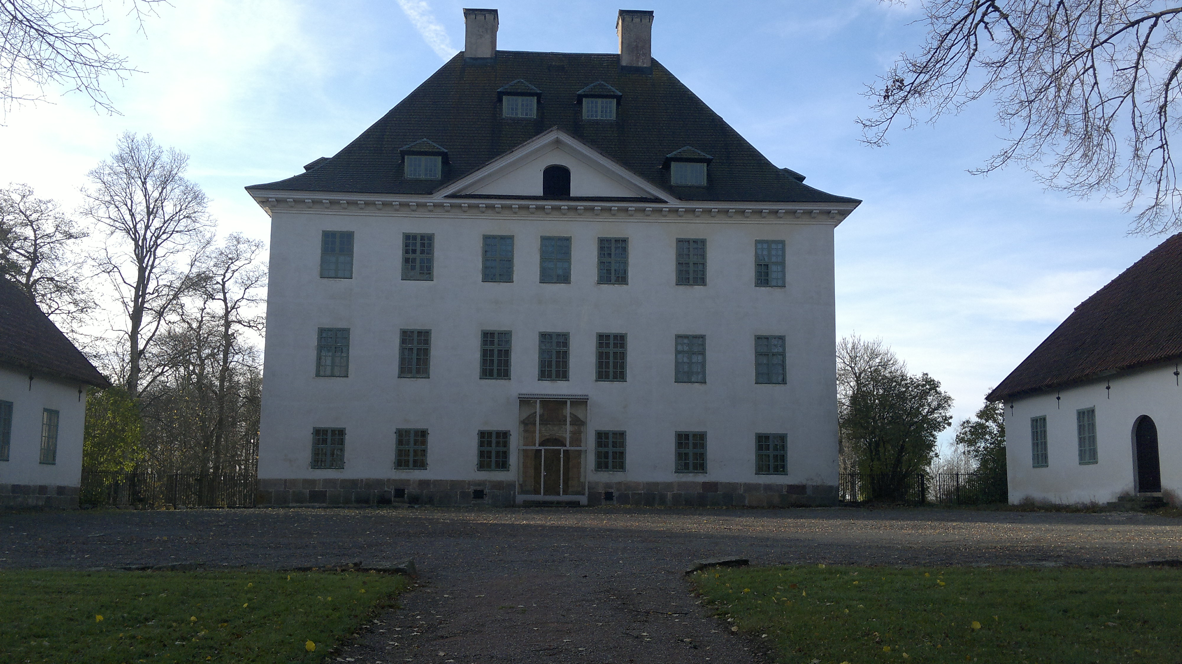 Louhisaaren linna